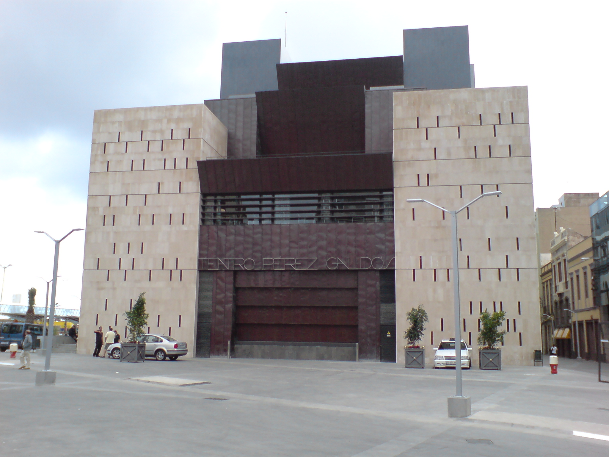 Teatro Pérez Galdós, plaza y nuevo cuerpo escénico y de servicios. 2007 Las Palmas de Gran Canaria.